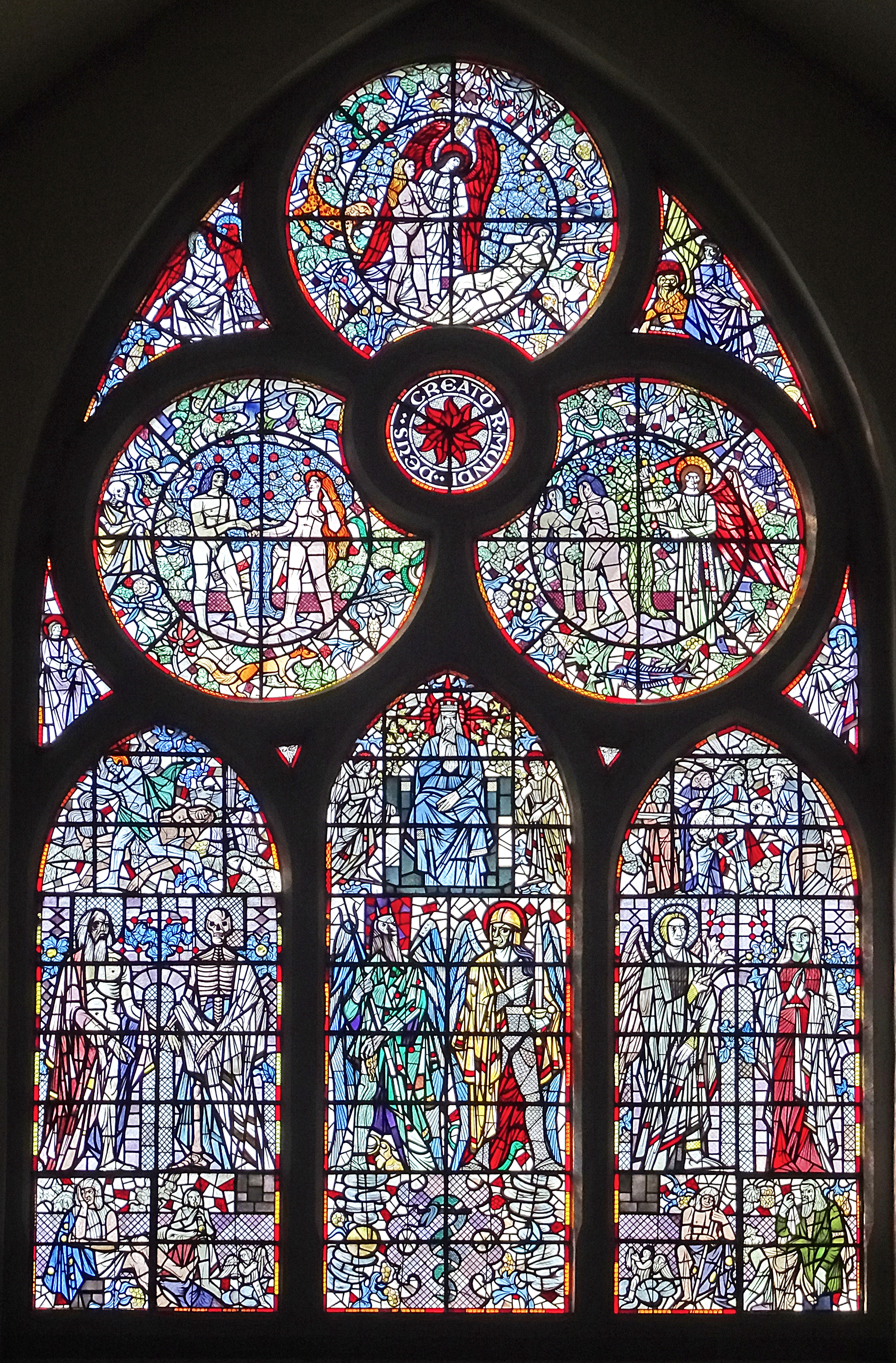 großes Westfenster von Karl Völker in der Thomaskirche zu Erfurt